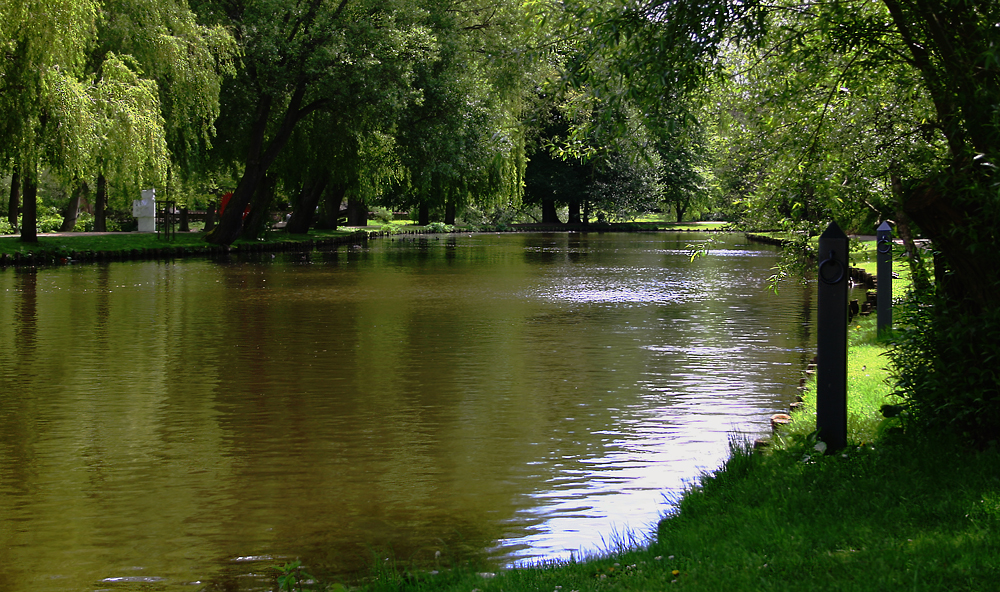 Odense Å